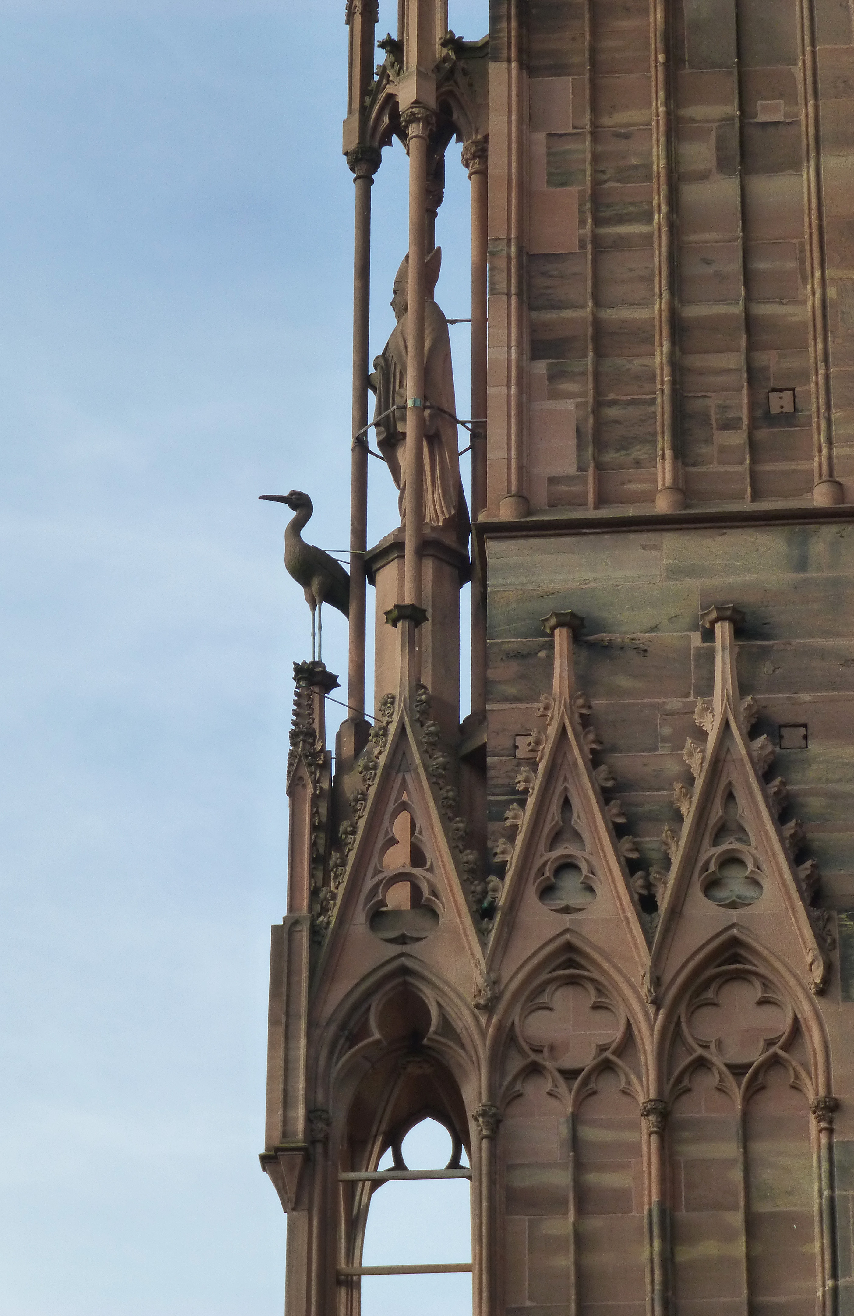 Strasbourg : détail de la cathédrale (cigogne) vu depuis le Cabinet des Estampes